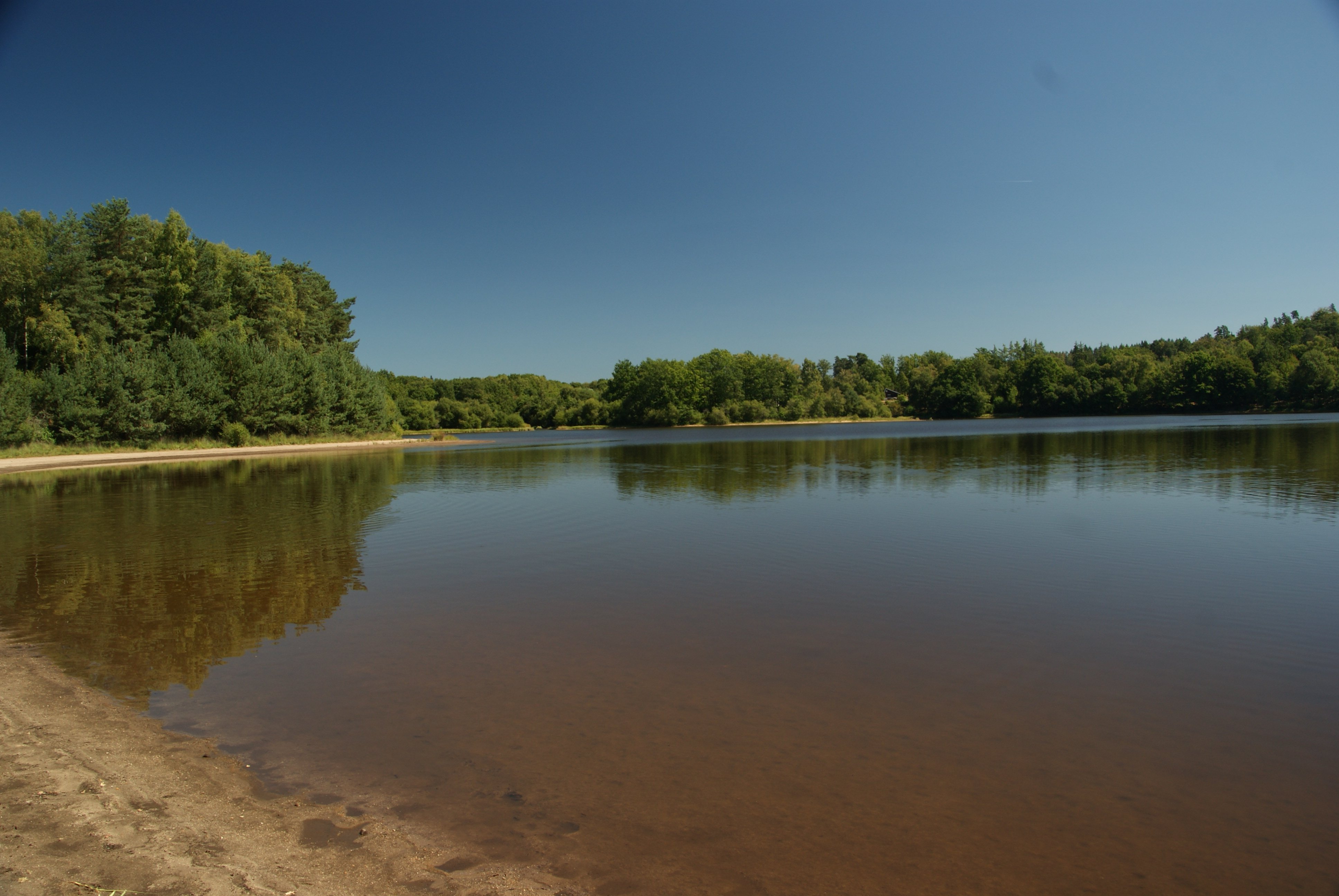 Lac de Feyt